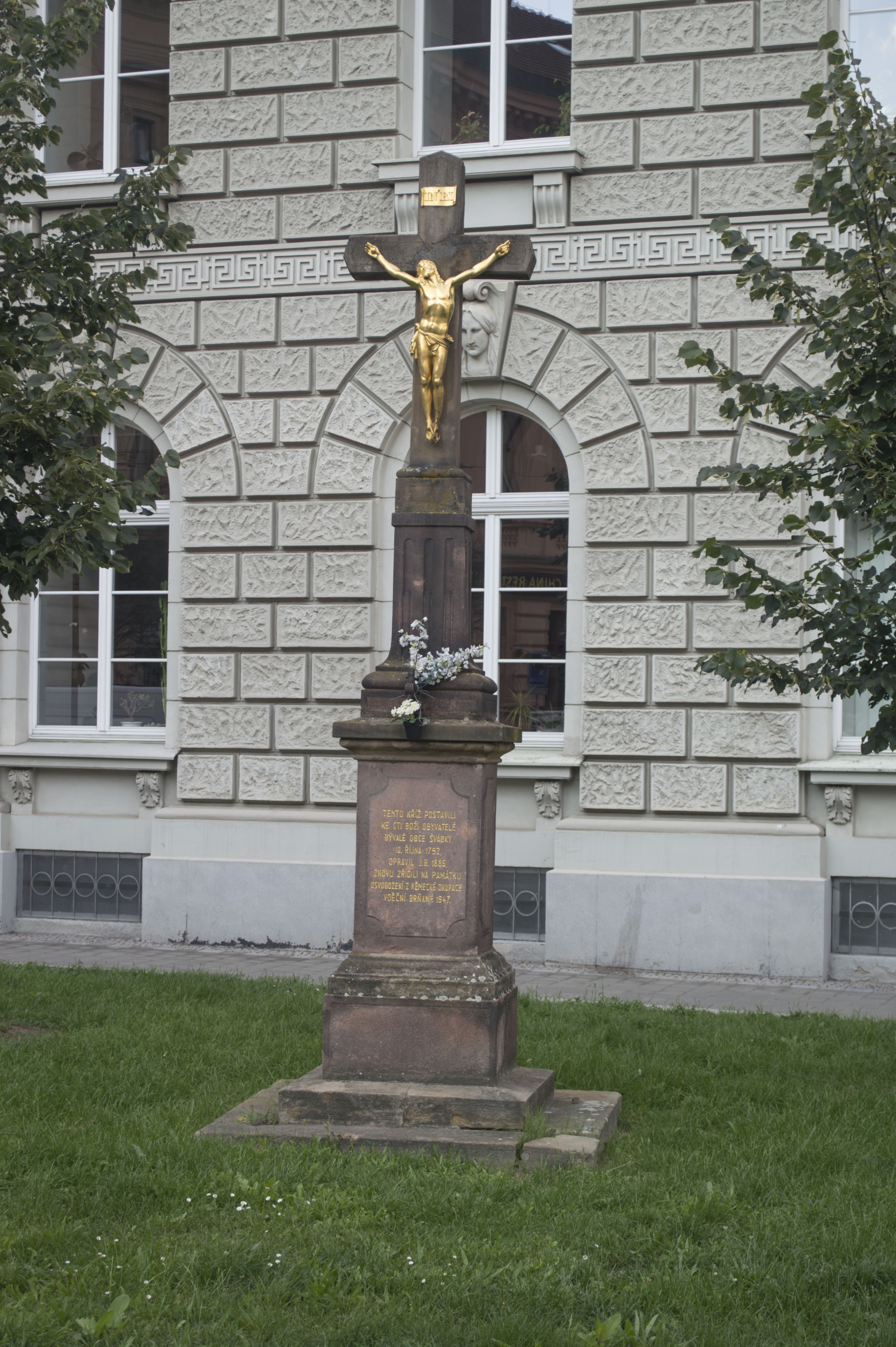 Pamětní kříž u Fakulty sociálních studií v Brně, který upomíná zaniklou ves Švábka.